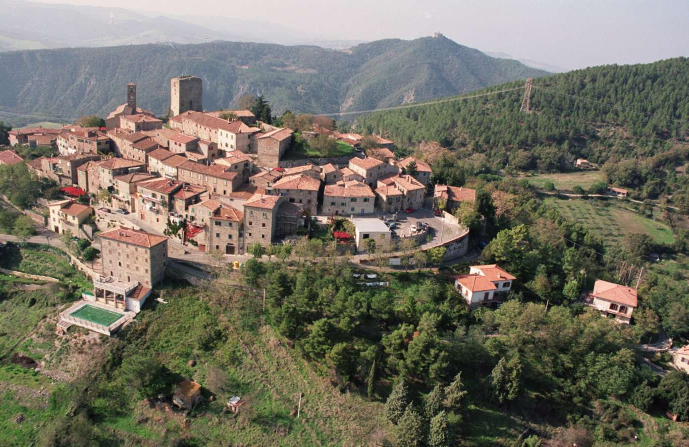 Vista del borgo medievale di Montecastelli